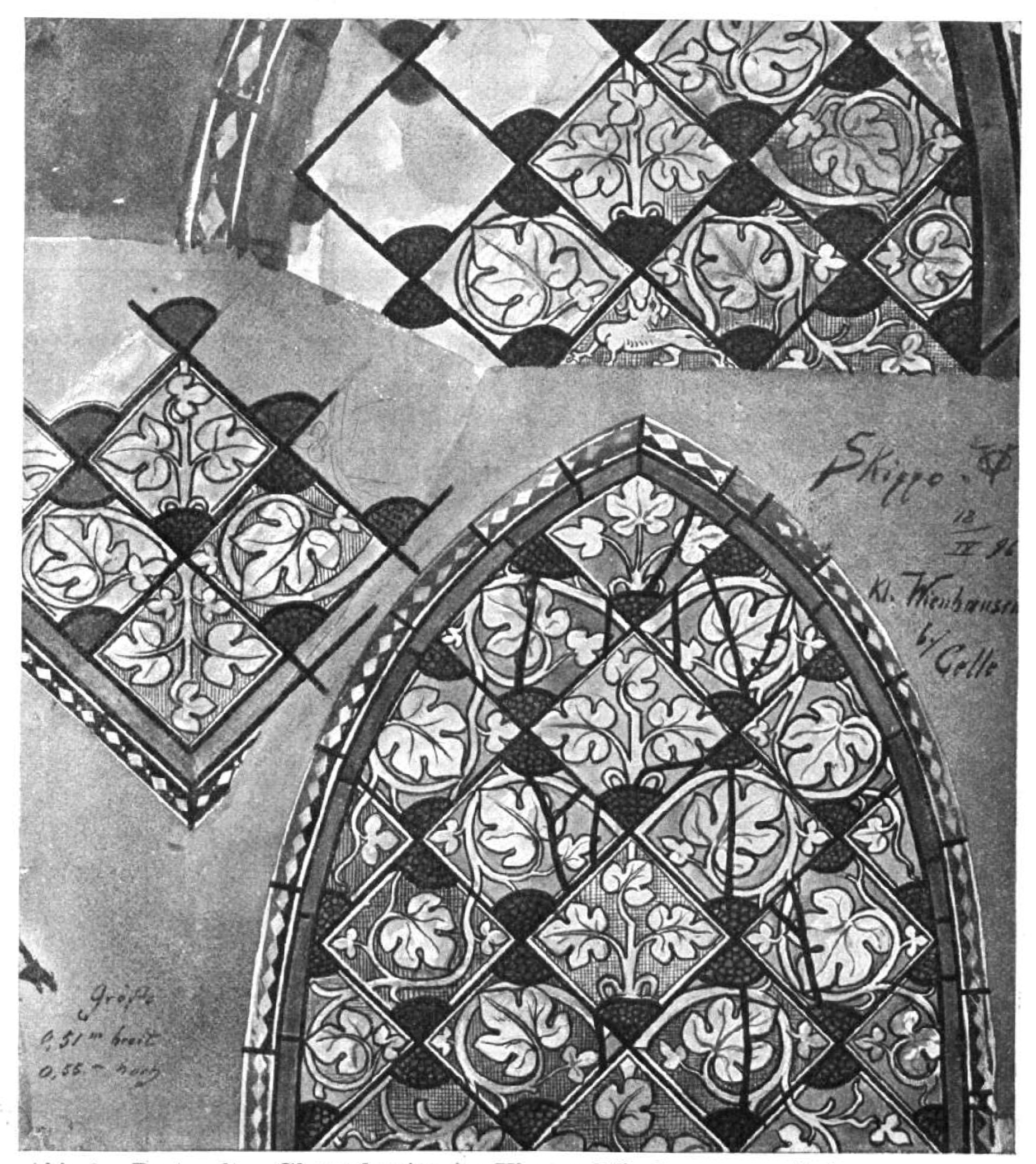 Ein Klostermuseum in der Heide. In: Die Denkmalpflege. 4 Jg., Berlin: Wilhelm Ernst & Sohn, 1902, S. 109–113.